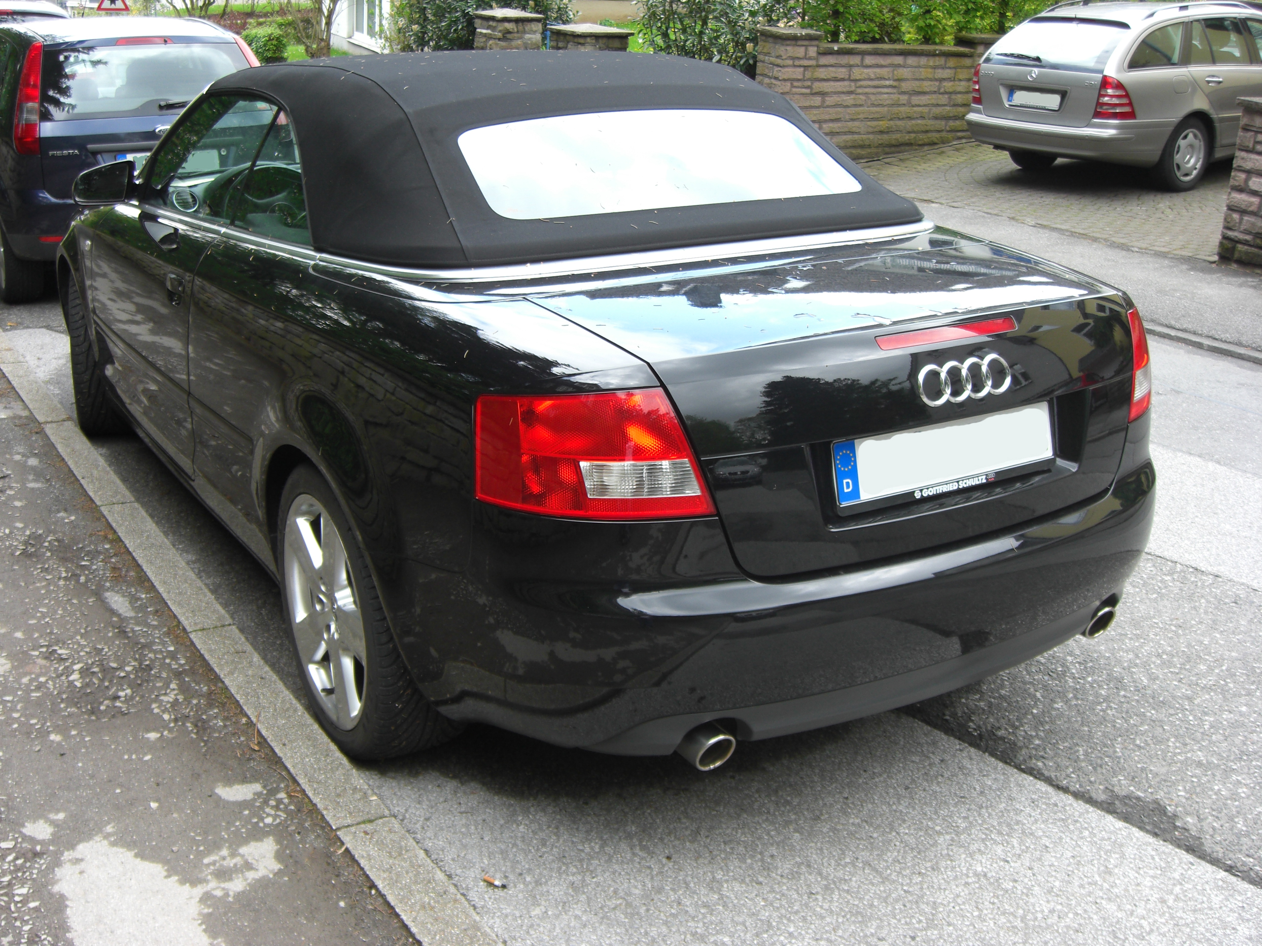 Audi A4 Cabriolet